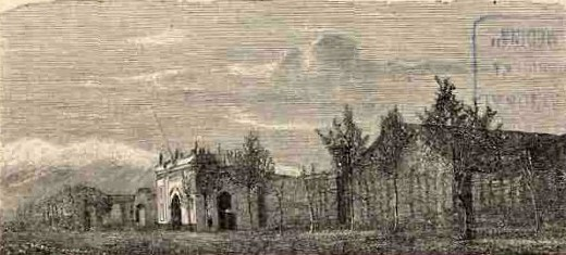 Santiago - La Penitenciaria (1872).